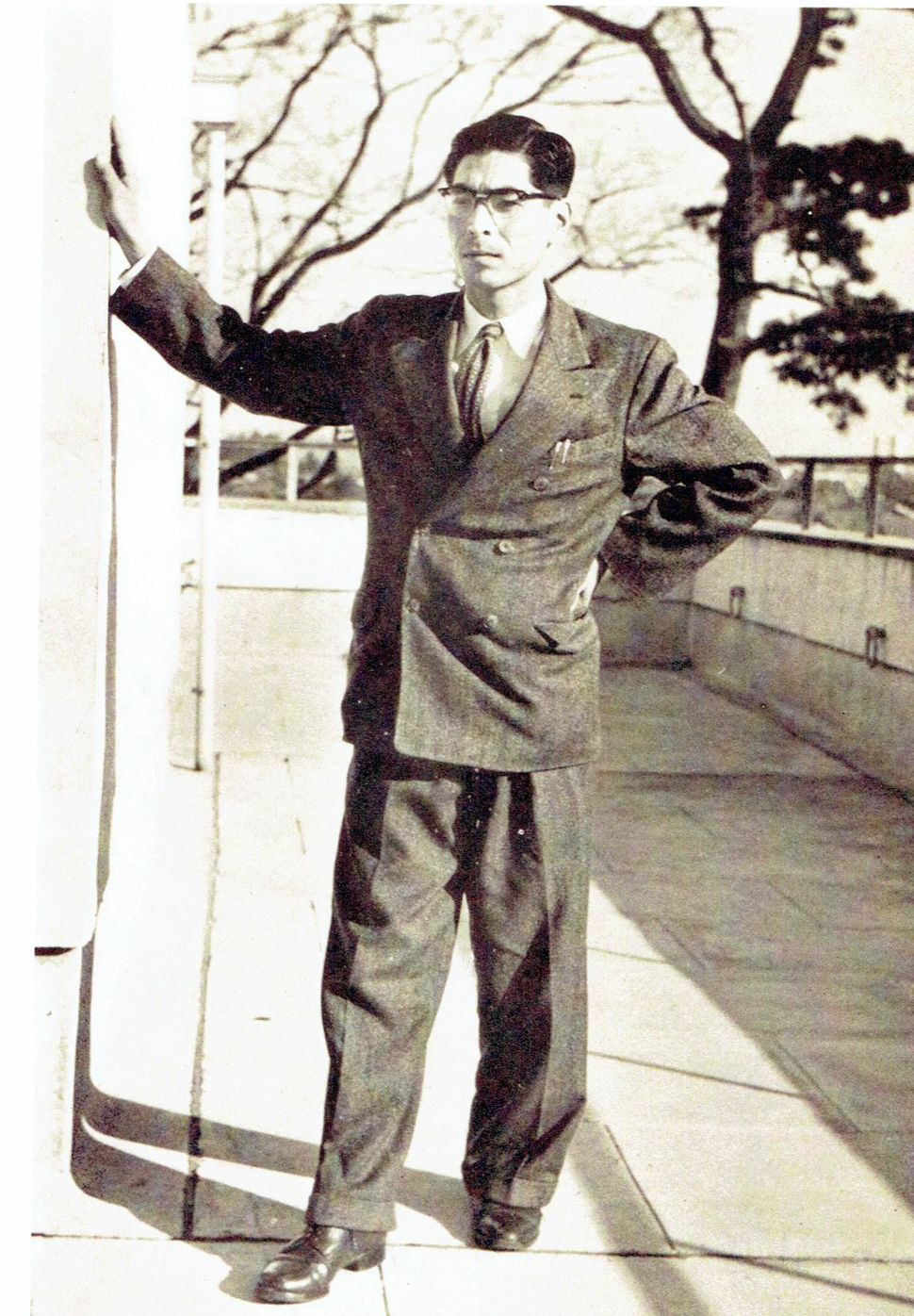 修道社『芥川賞作品集』（1956）より小谷剛